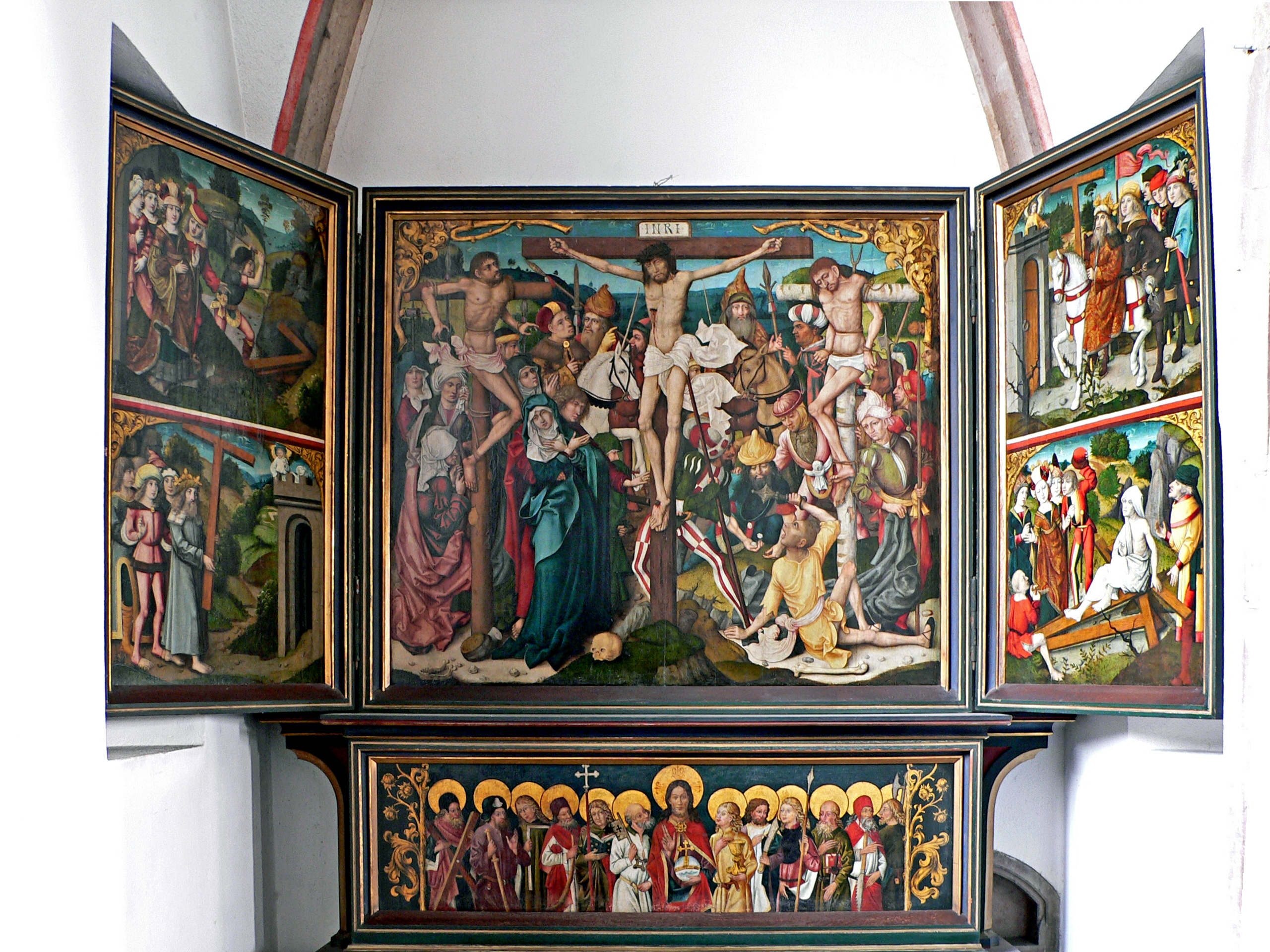 Kreuzaltar von 1485 in der mittleren Seitenkapelle der Justinuskirche Höchst. Auf dem Mittelteil wird die Kreuzigung Jesu dargestellt. Auf den vier Tafeln der Seitenflügel wird "über Kreuz" die Auffindung des Kreuzes durch Helena, die Mutter des Kaisers Konstantin, und die triumphale Überführung des Kreuzes durch Kaiser Heraklios dargestellt. Auf der Predella unterhalb des Mittelbildes wird Jesus im Kreis der Apostel gezeigt.